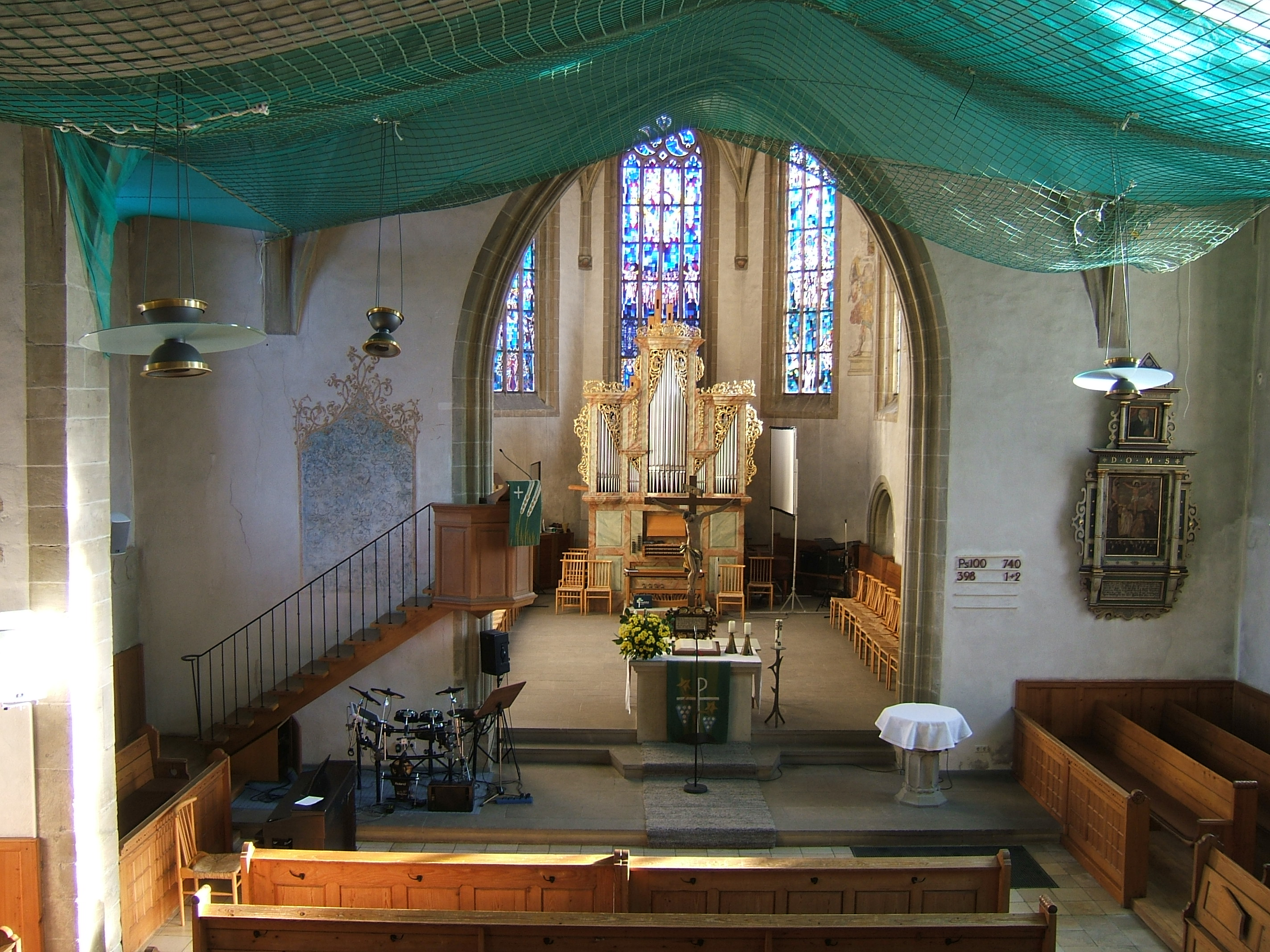 St.-Veit-Kirche Gärtringen, Blick von der Westempore, Netz zum Schutz vor Steinschlag aus dem Gewölbe des Langhauses